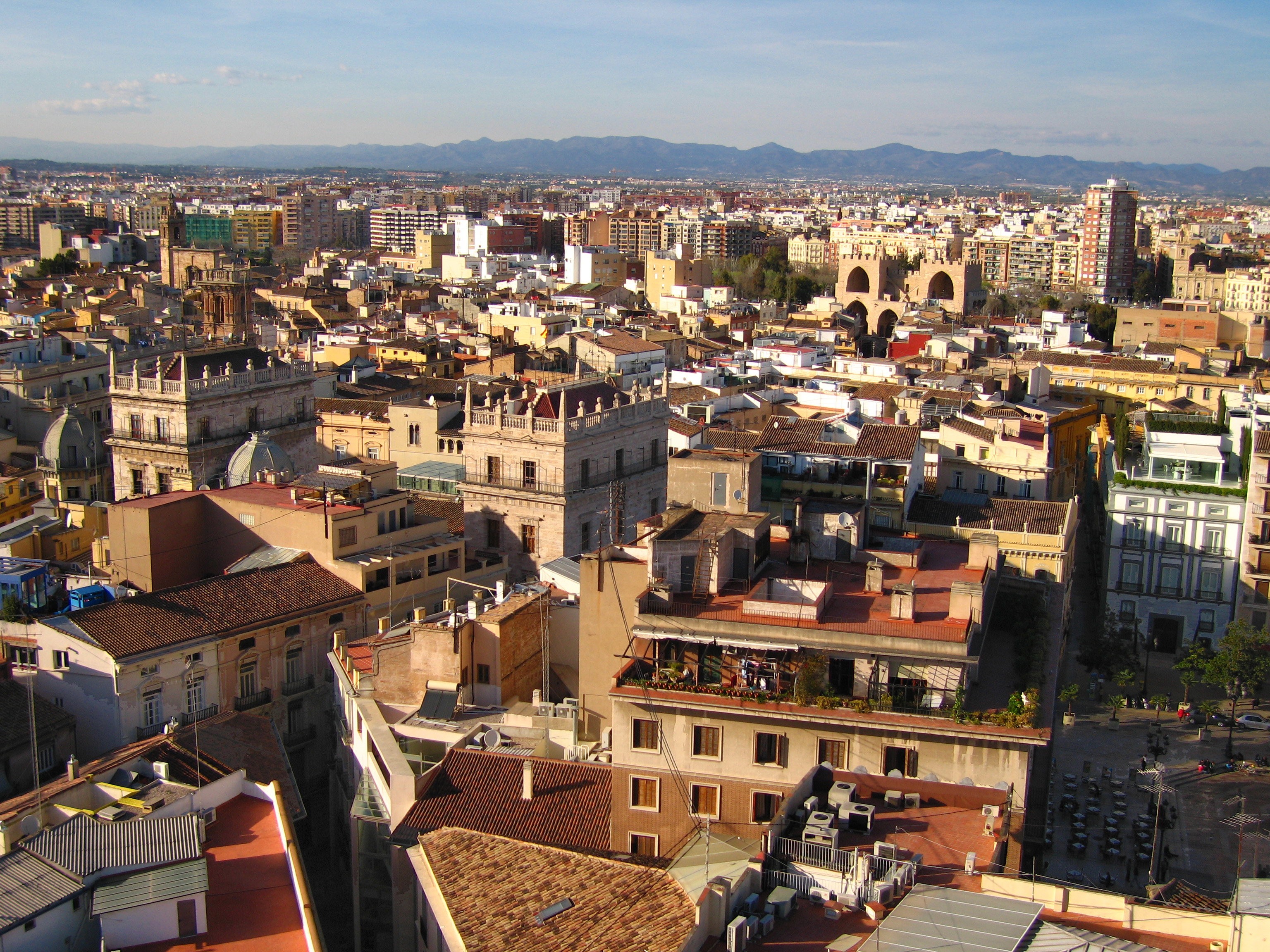 Palau de la Generalitat de València i Serra Calderona